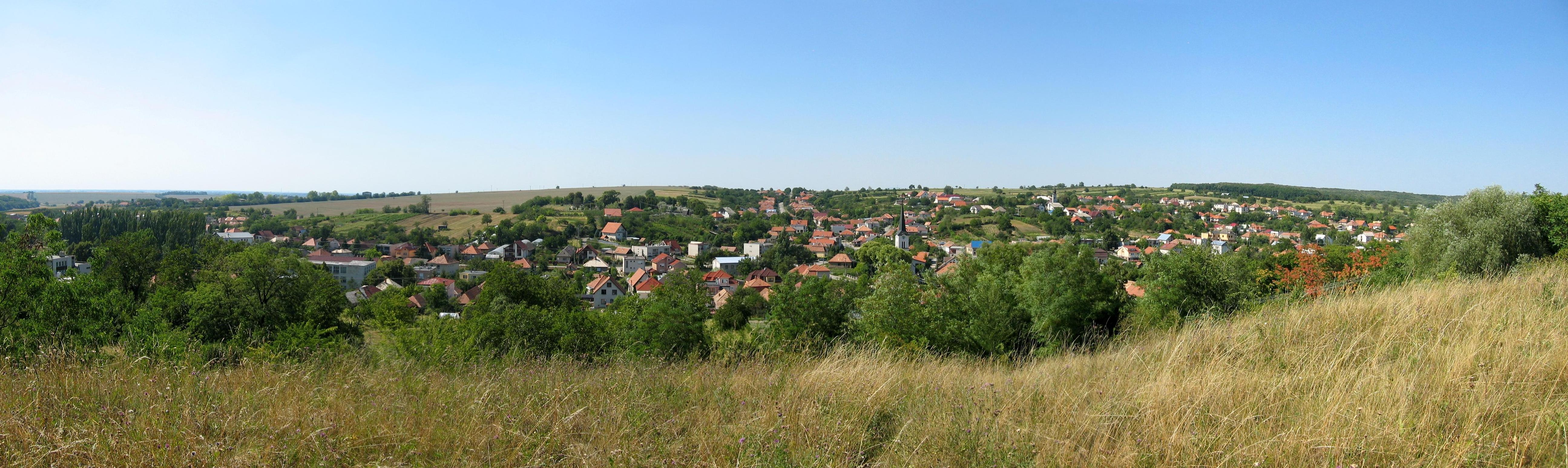 Velke Lovce, pohlad z pazit, Canon DIGITAL IXUS 400